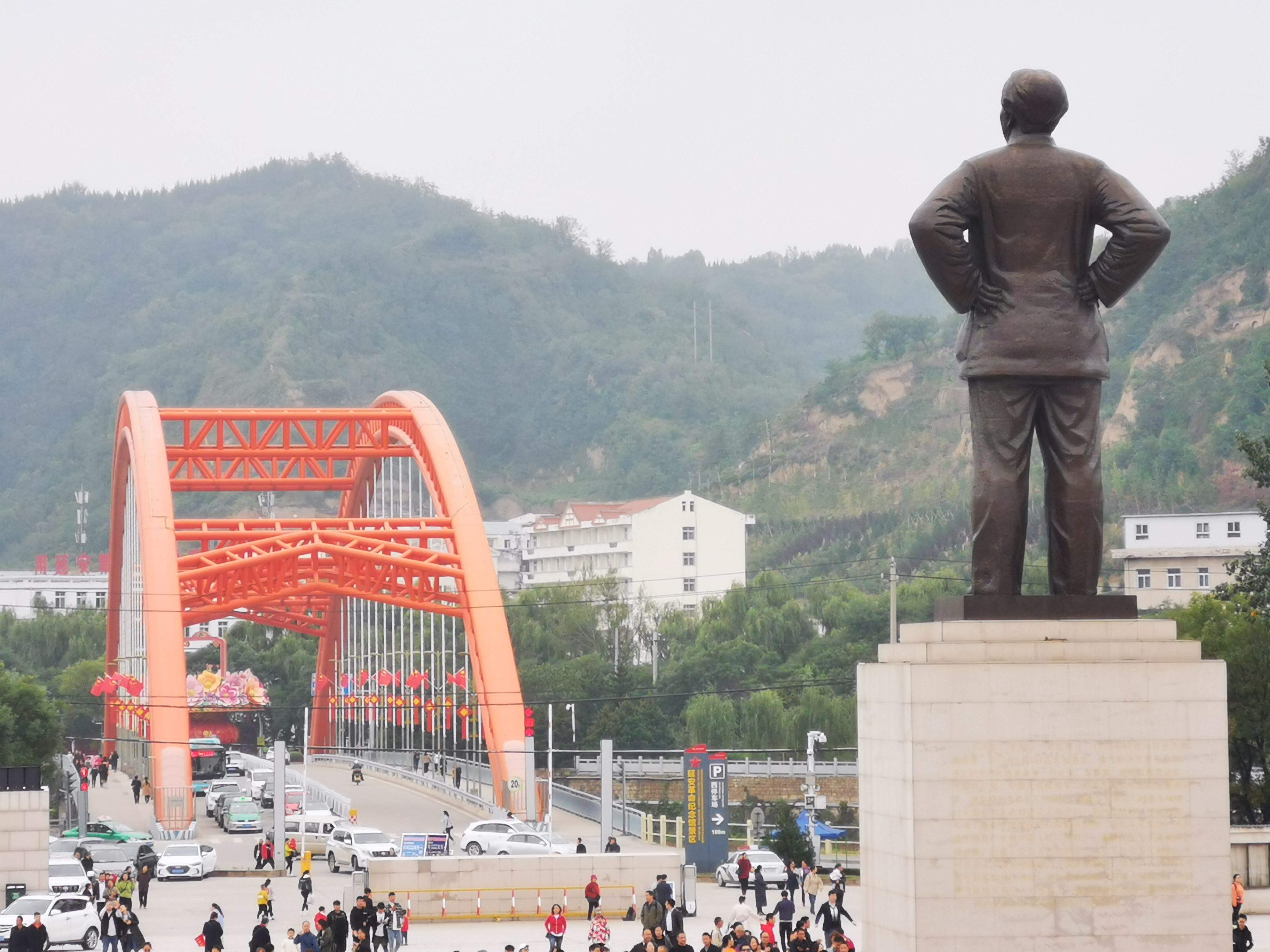 延安市宝塔区延安革命纪念馆及其前的毛泽东雕像